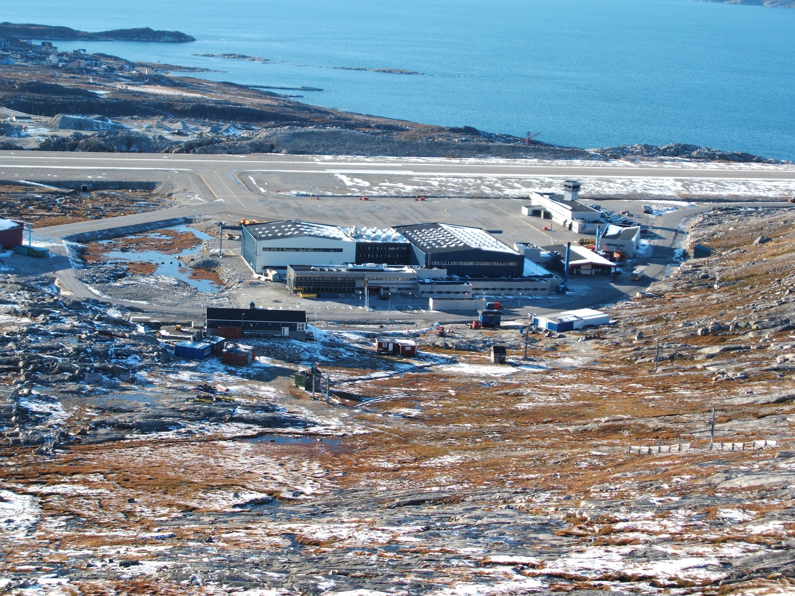 Nuuk lufthavn / Mittarfik Nuuk